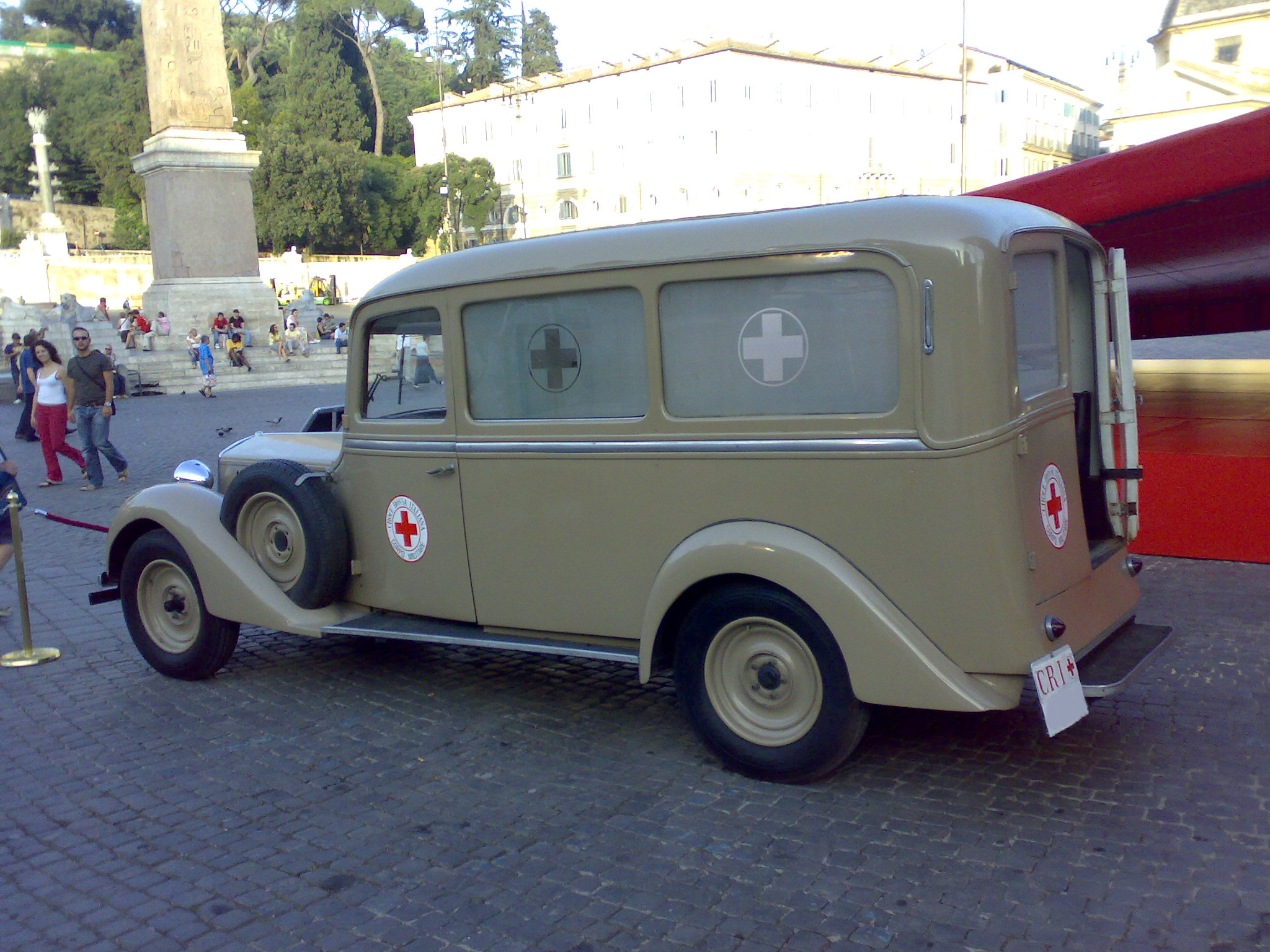 Bianchi S9 ambulanzaz